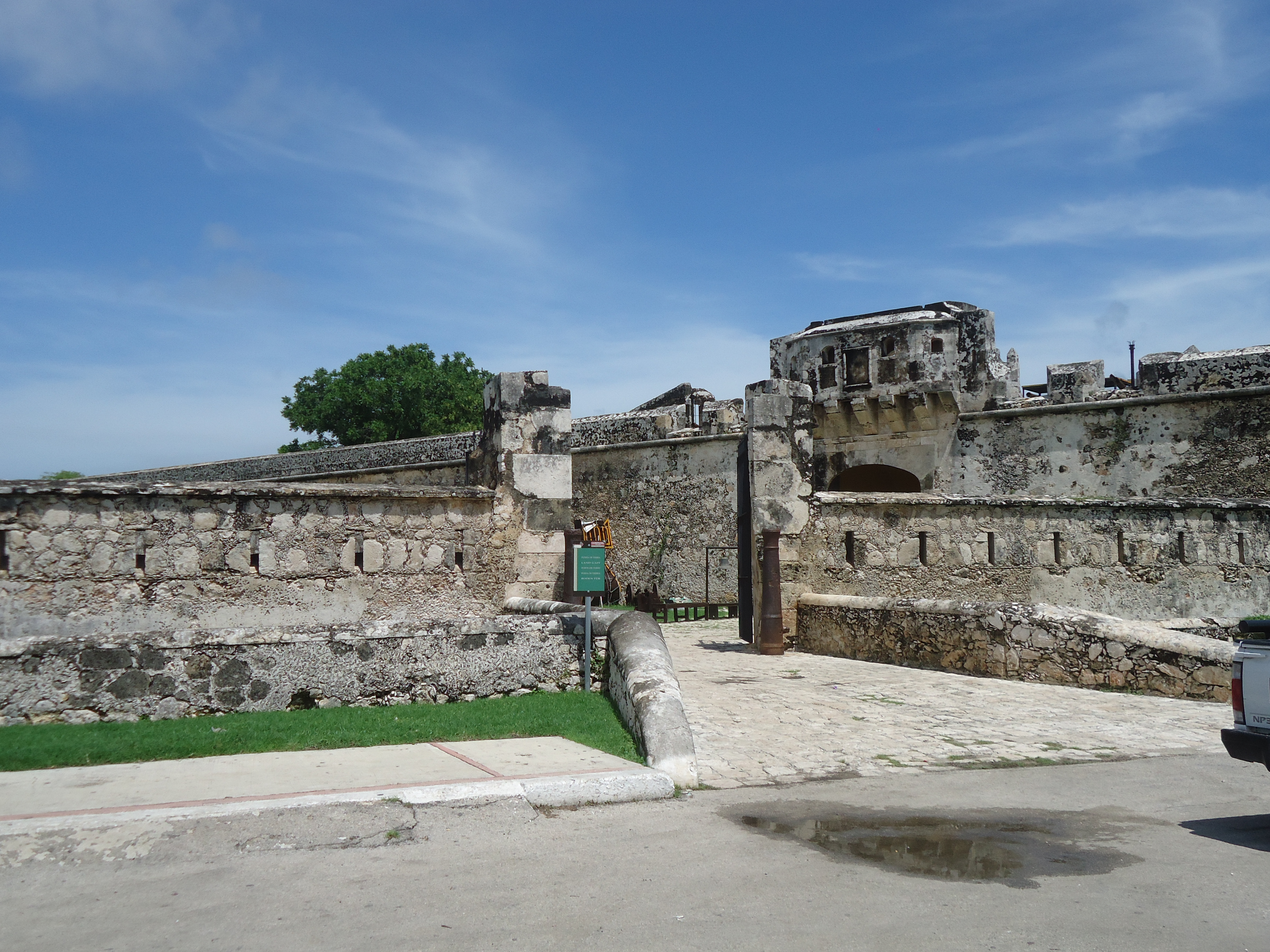 Puerta de Tierra — las murallas de San Francisco de Campeche, estado de Campeche, México.